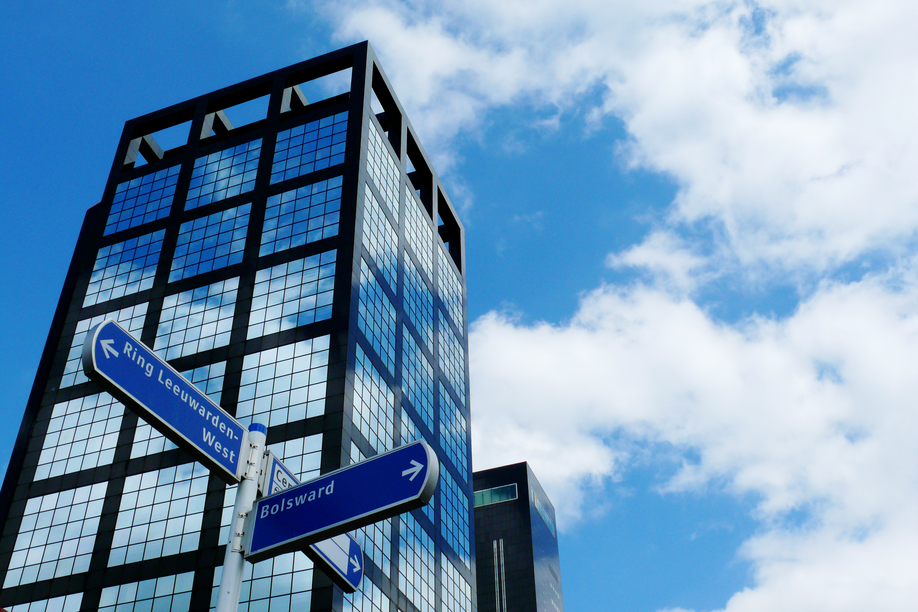 De Achmeatoren (op achtergrond) is de hoogste toren van Leeuwarden en vormt een belangrijk deel van de 'skyline'.